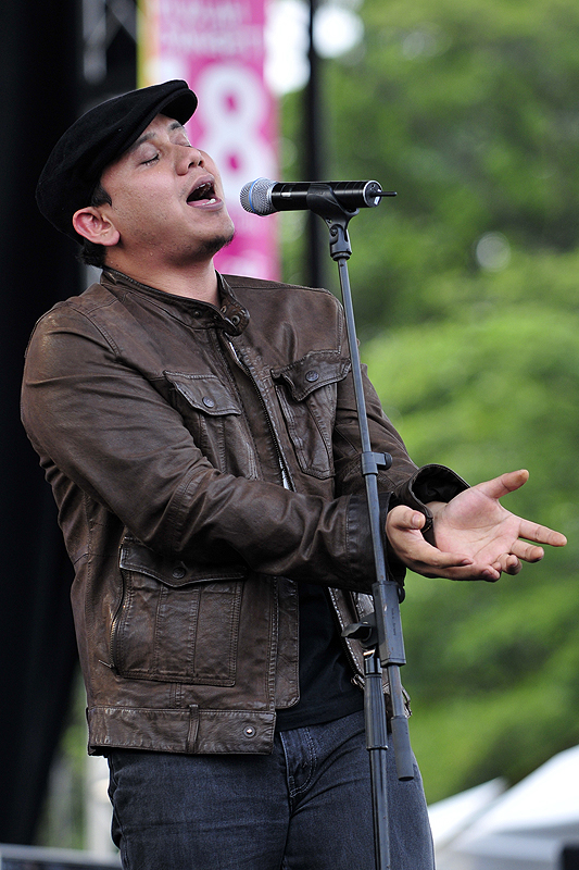 Konsert Pesta Malam Indonesia 3